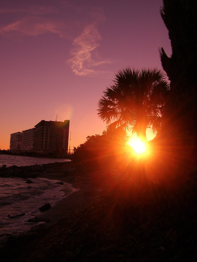 Digimax A50 / KENOX Q2